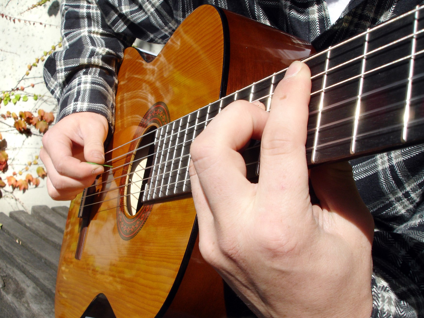 Playing Songs